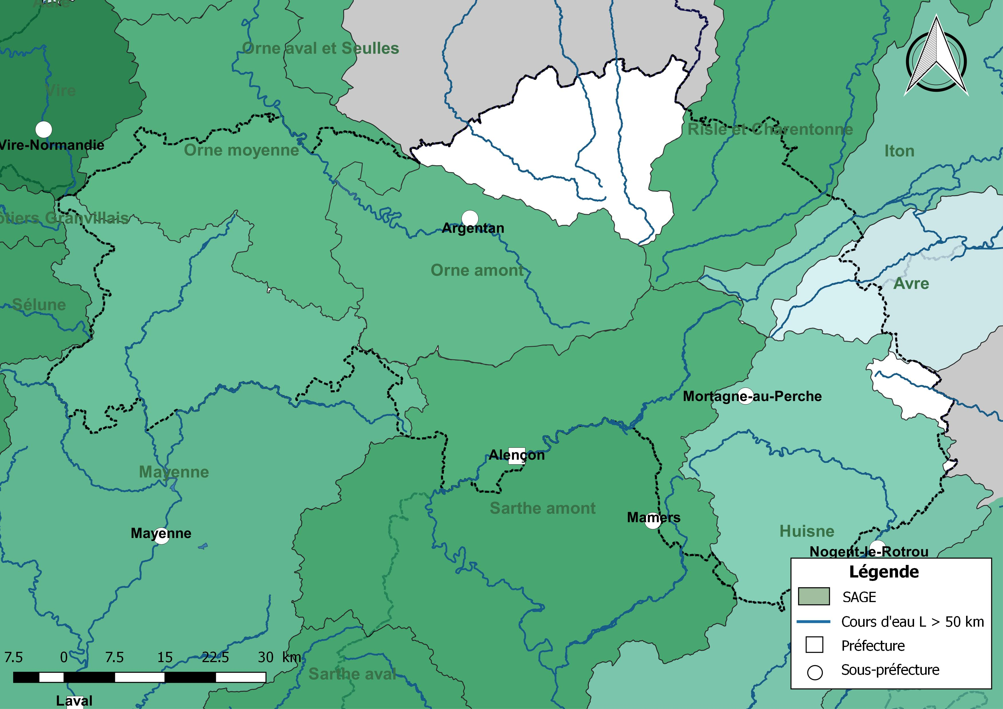 Carte des schémas d'aménagement et de gestion des eaux (SAGE) concernant le département de l'Orne (France) au 1er janvier 2018.